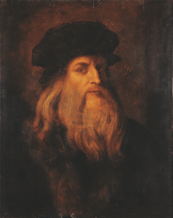 Possibile autoritratto di Leonardo da Vinci - Galleria degli Uffizi Firenze